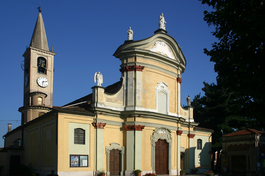 La chiesa parrocchiale di Tornaco (NO)